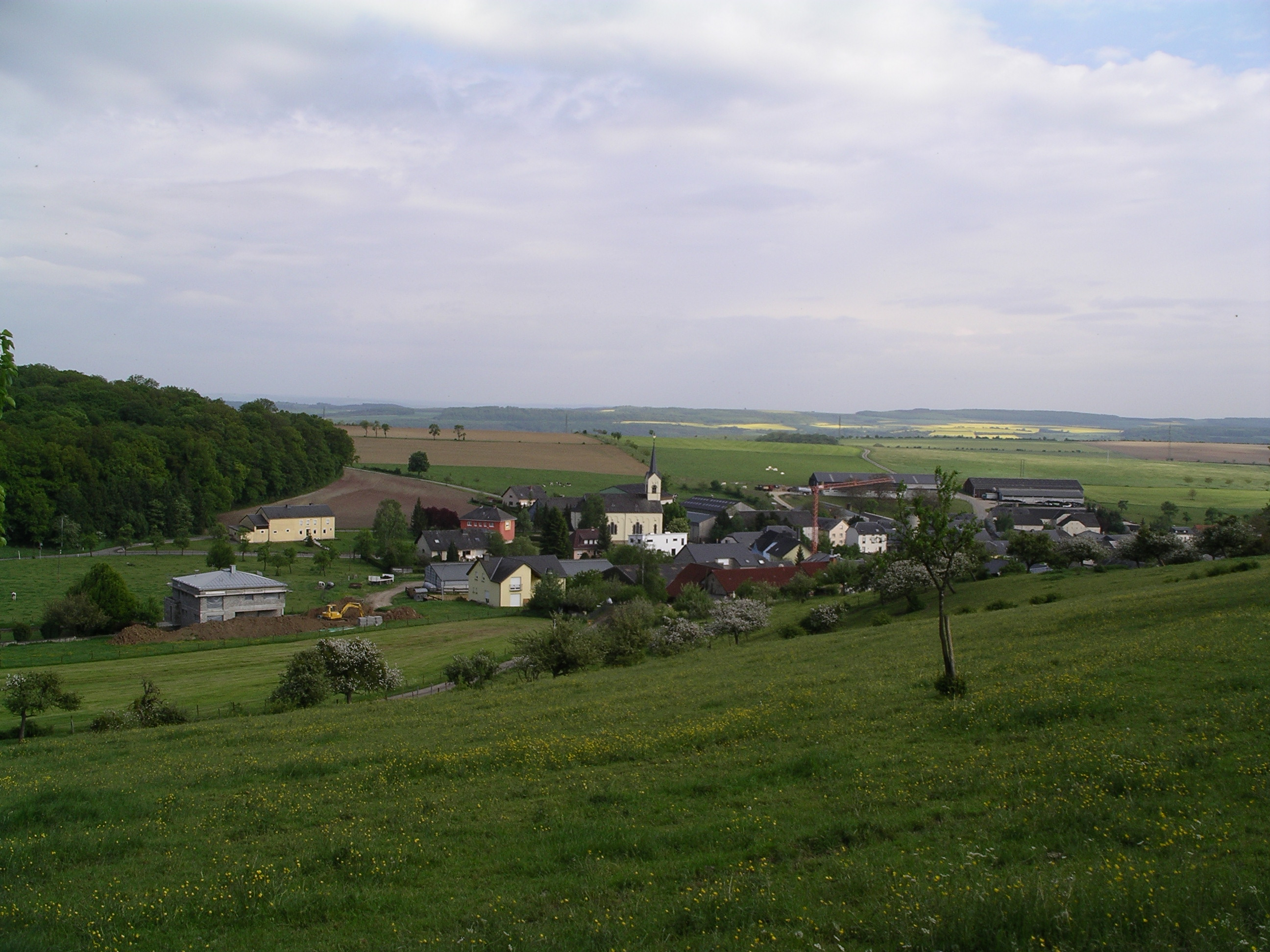 Lellig, Gemeinde Manternach (Luxemburg), Fernansicht